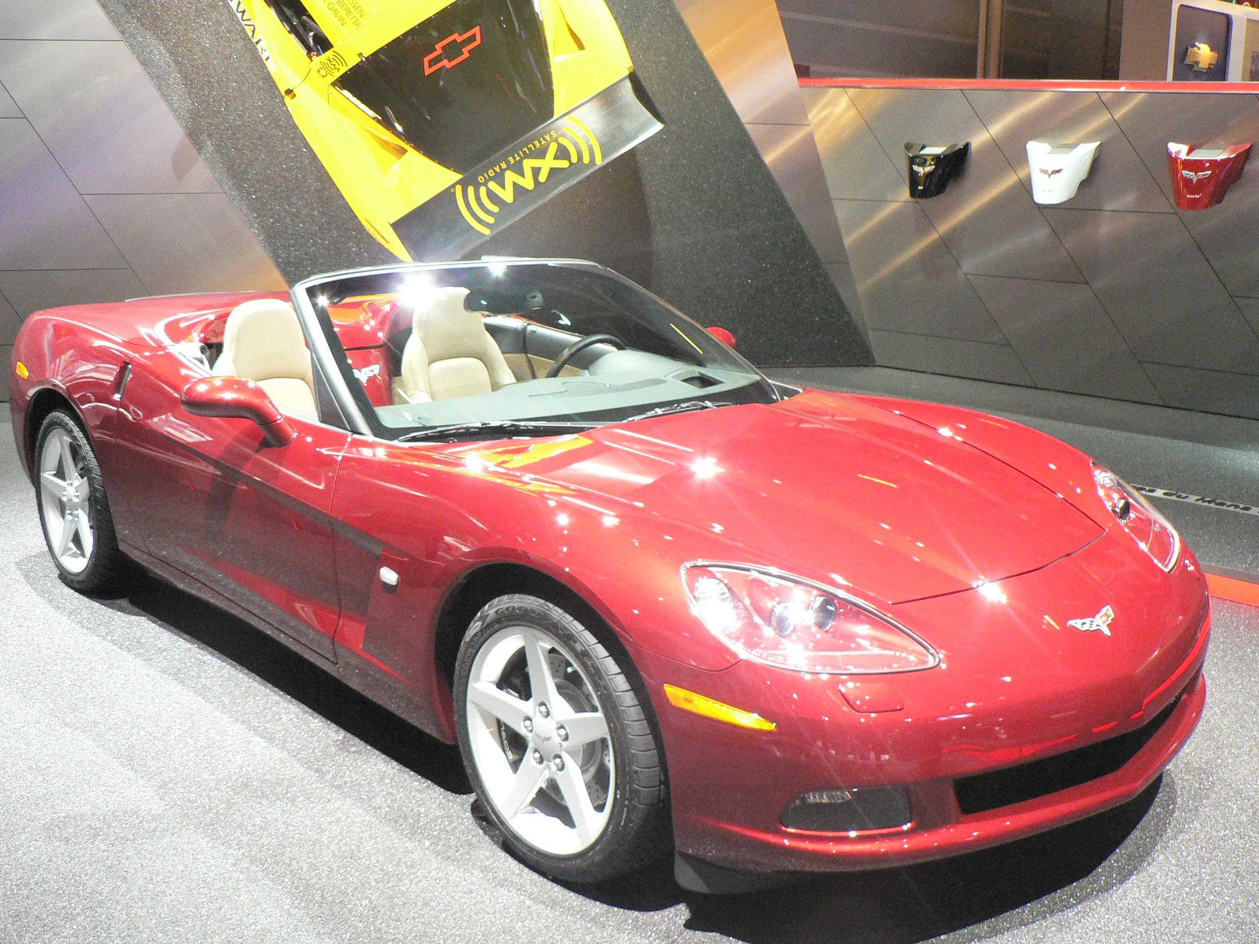 Mondial de l automobile de Paris (October 2006)